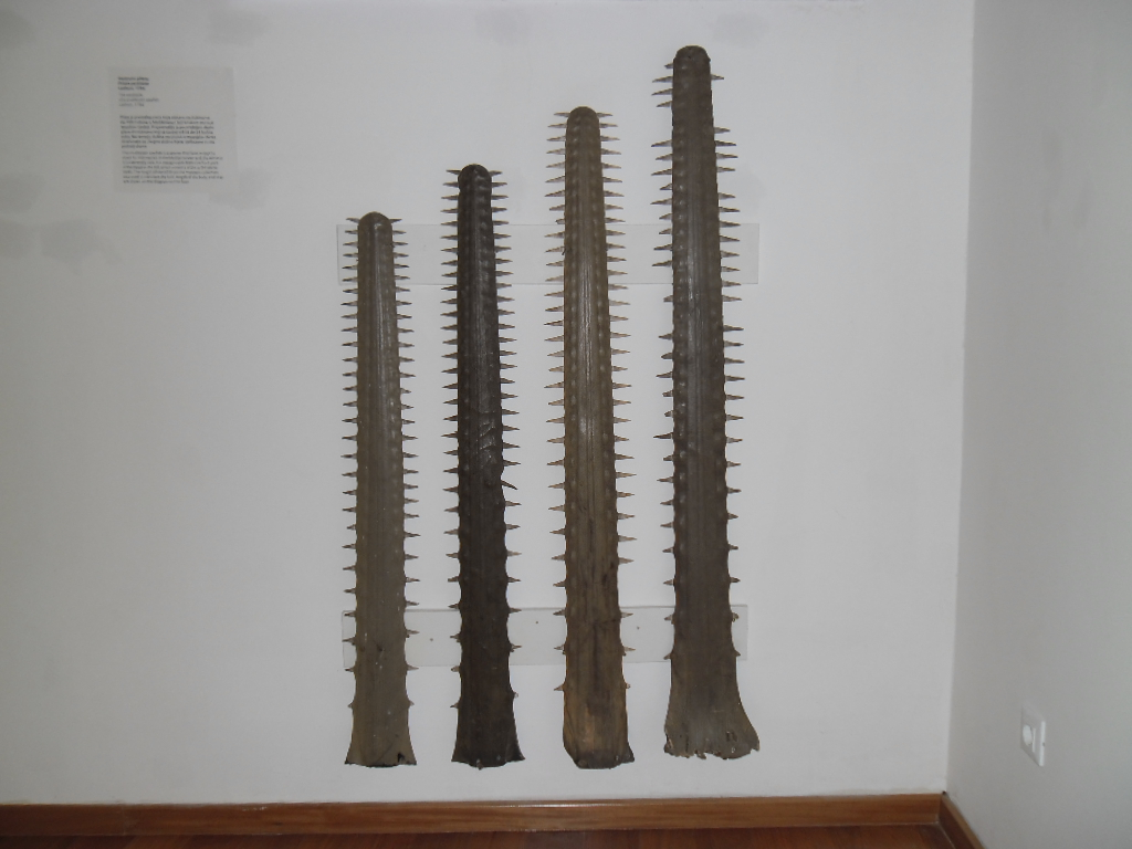 rostrumi morskog psa pilana, dubrovački prirodoslovni muzej